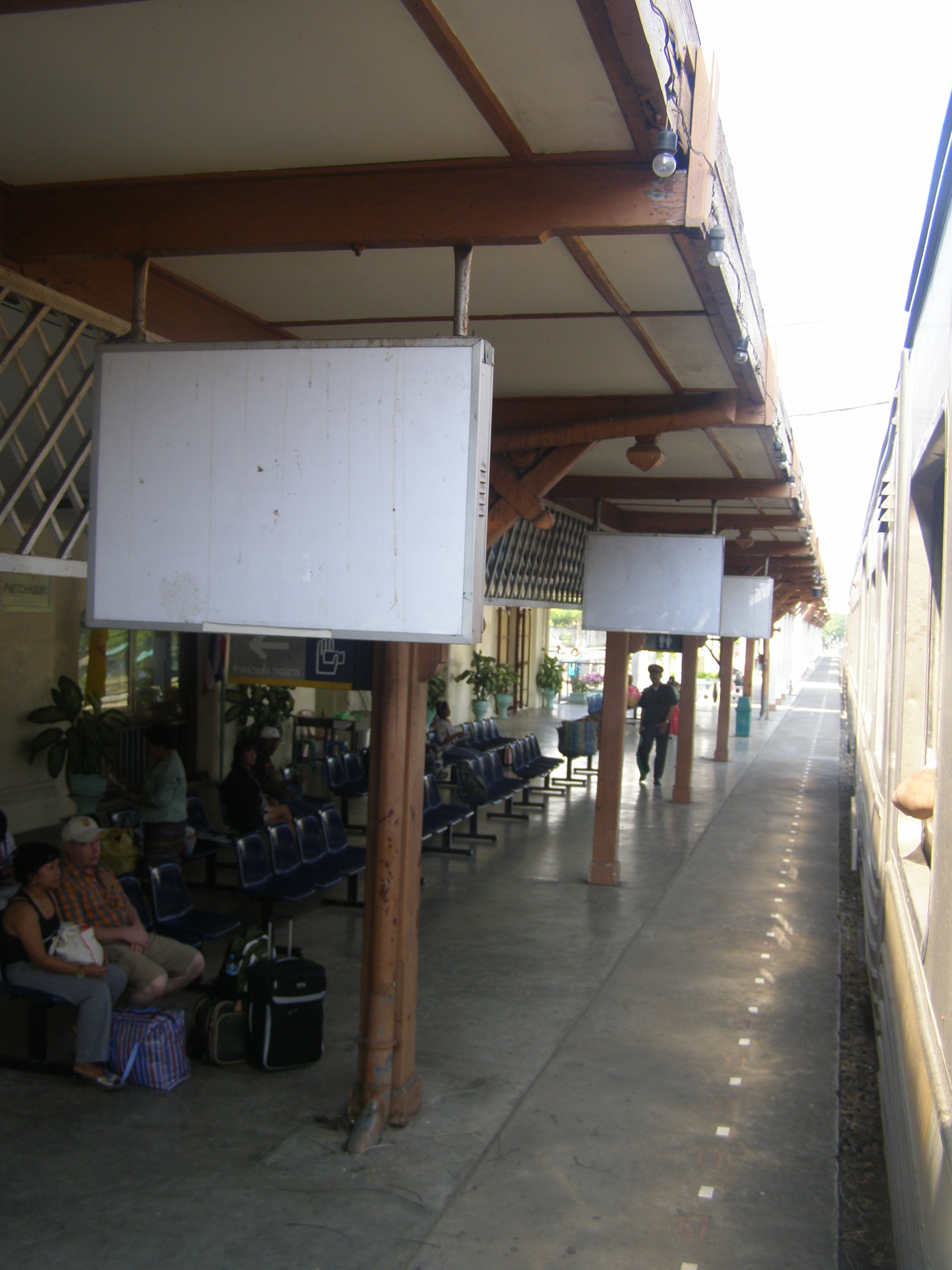 สถานีรถไฟหนองไม้เหลือง